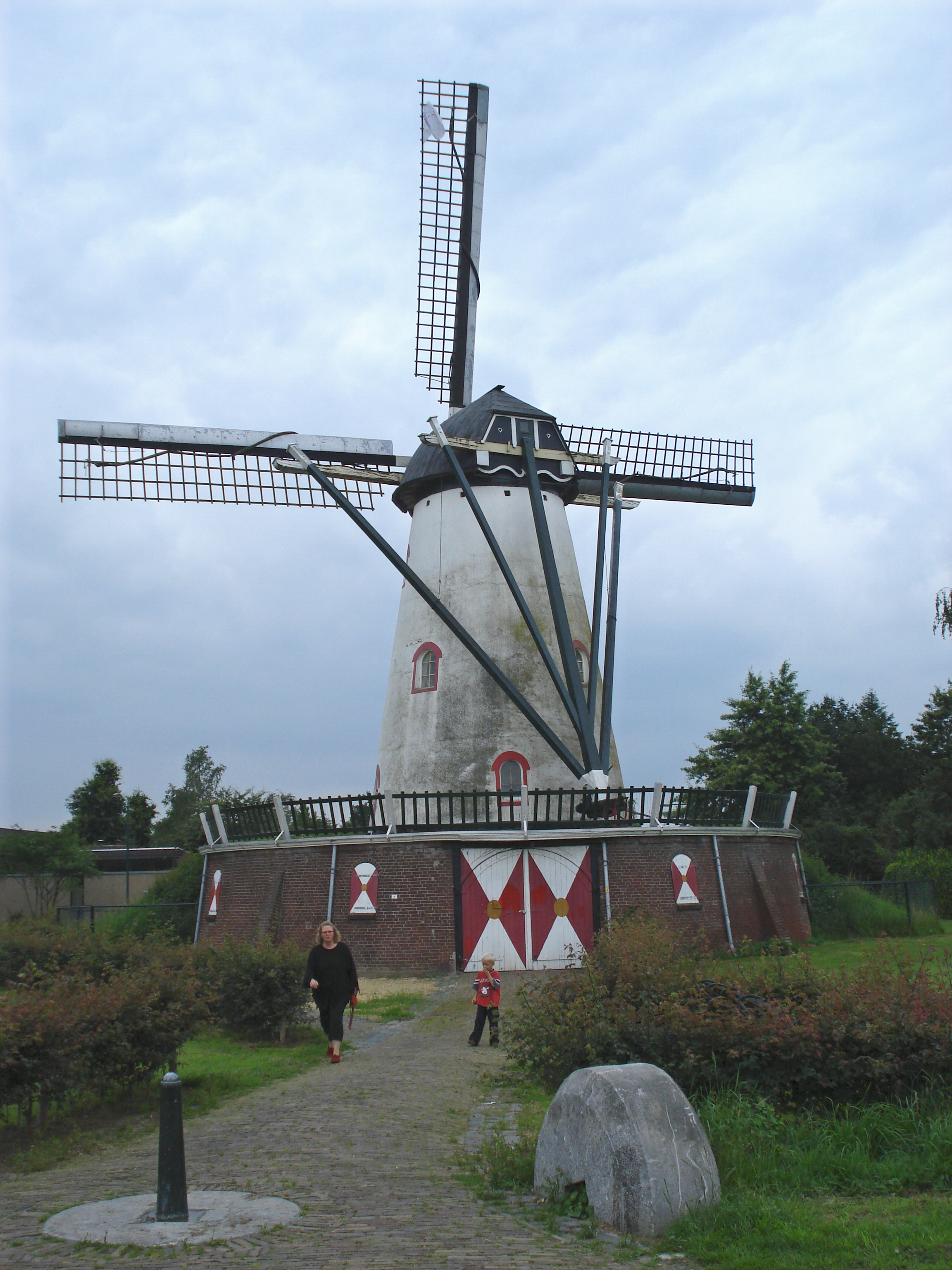 Cuijk, moulin Jan van Cuijk